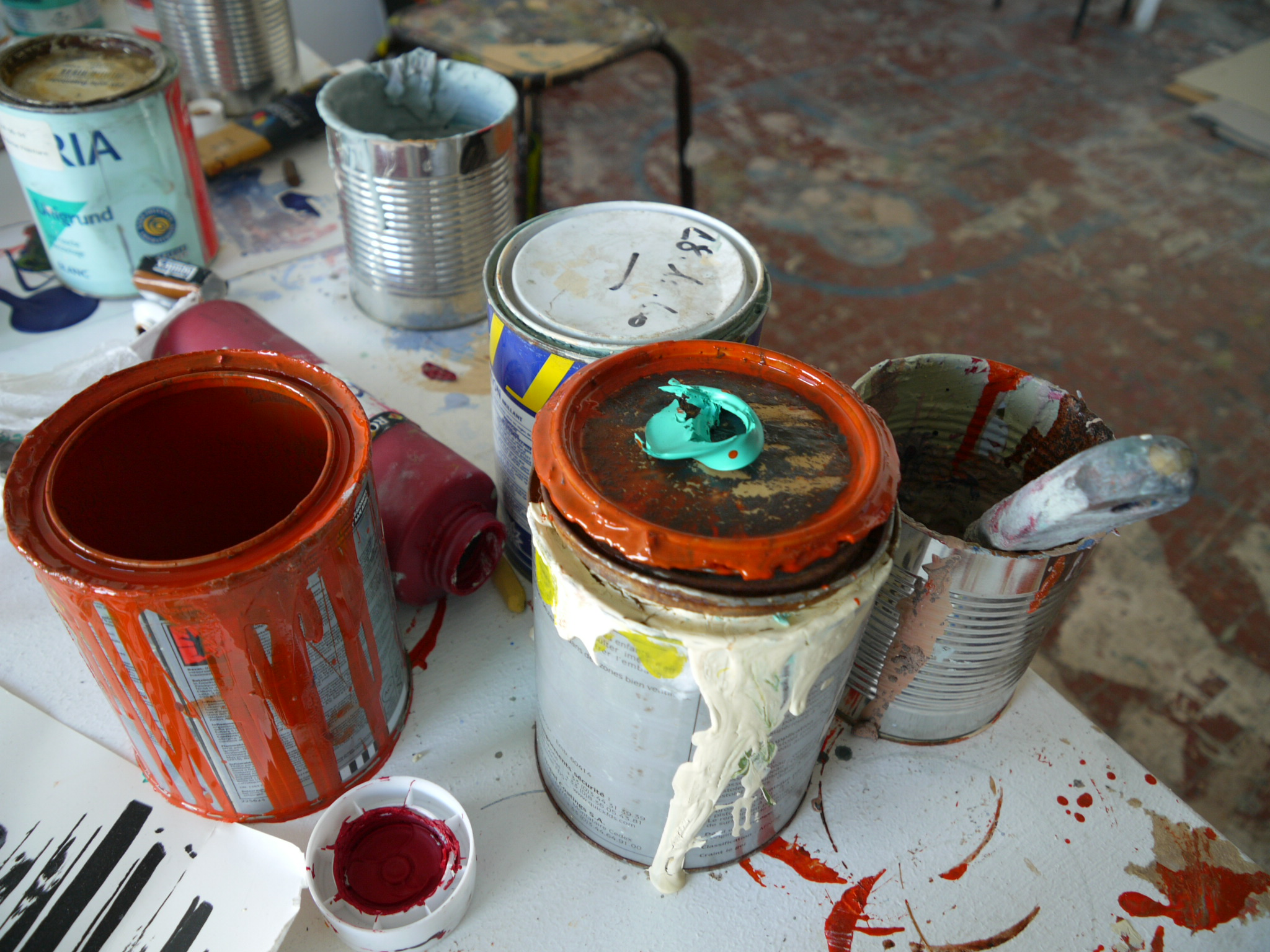 Vue d'un atelier de l'école Supérieure d'Art et Design de Valence, peinture